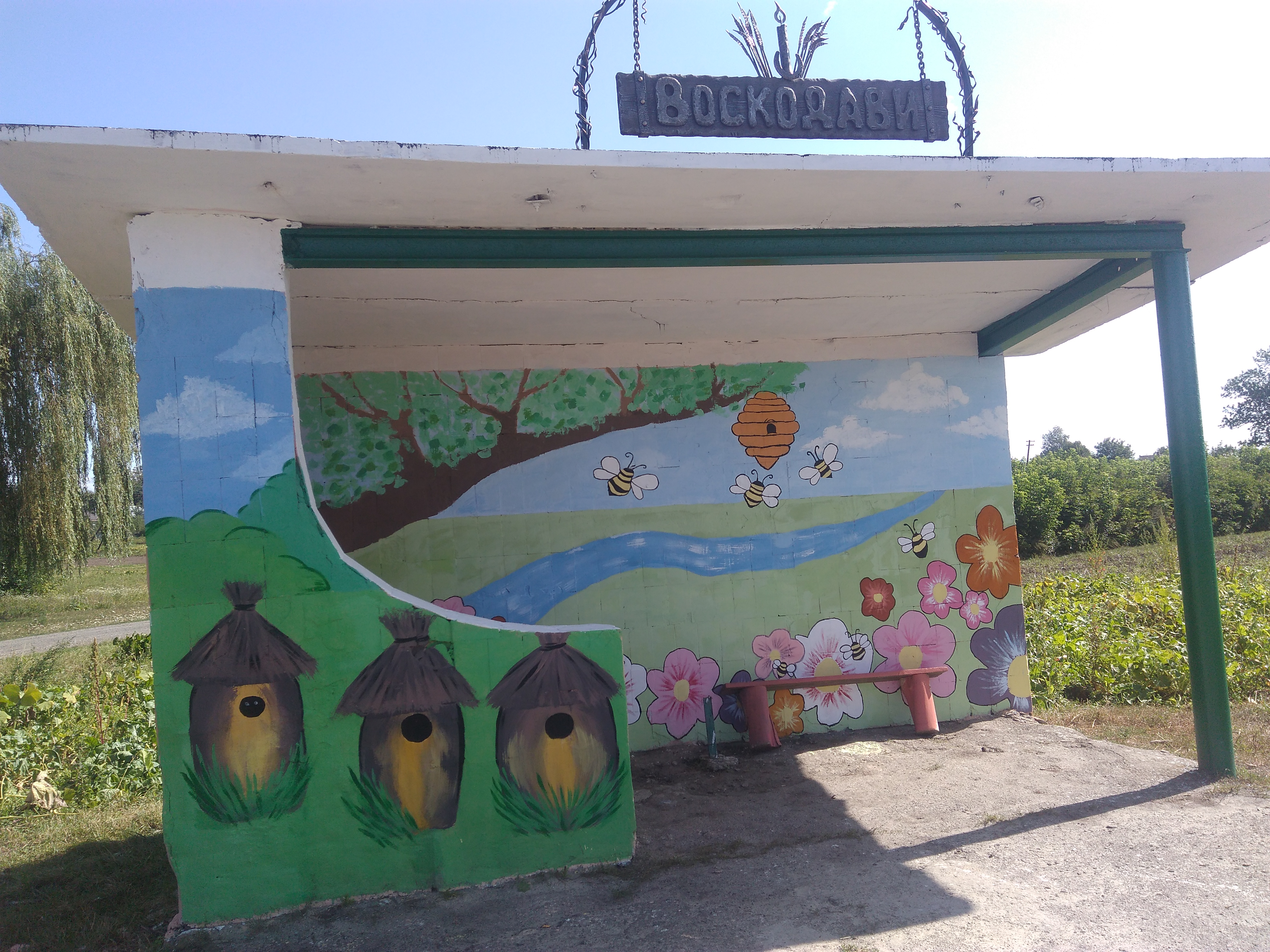 Місцева зупинка, яка знаходиться в центрі села Воскодави